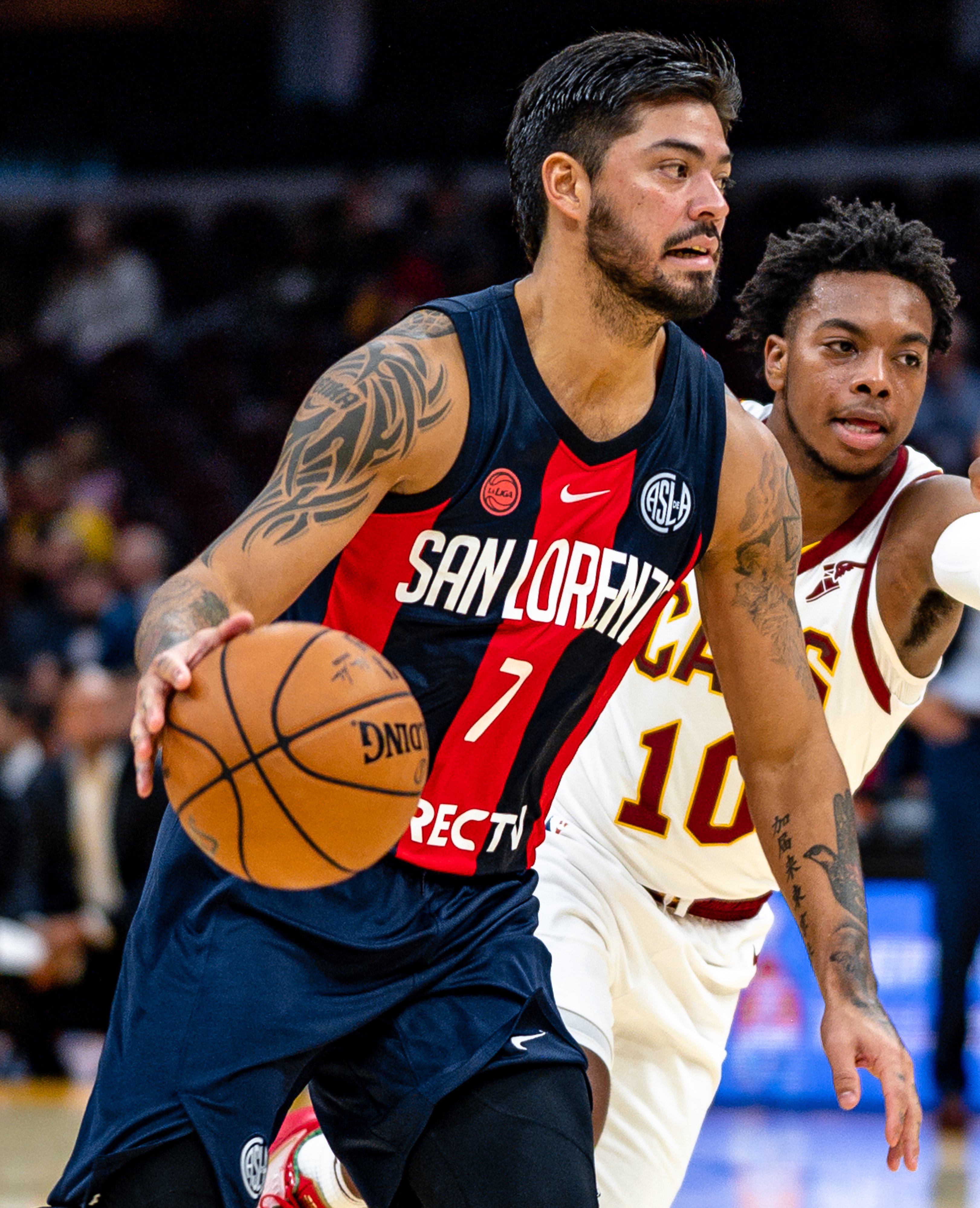 Cleveland Cavaliers vs. San Lorenzo